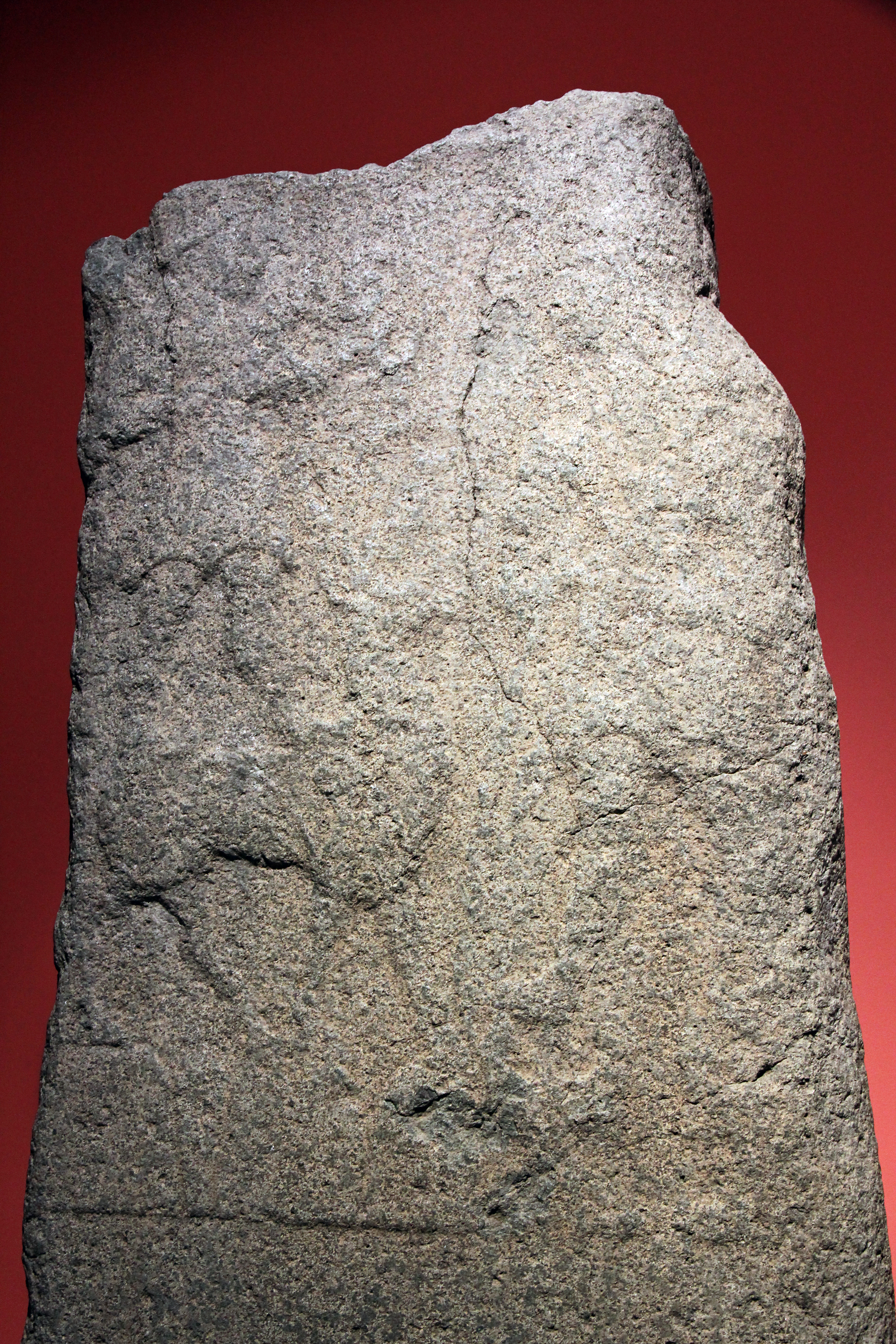 Archäologisches Museum Sivas, Zentraltürkei, hethitische Stele von Altınyayla